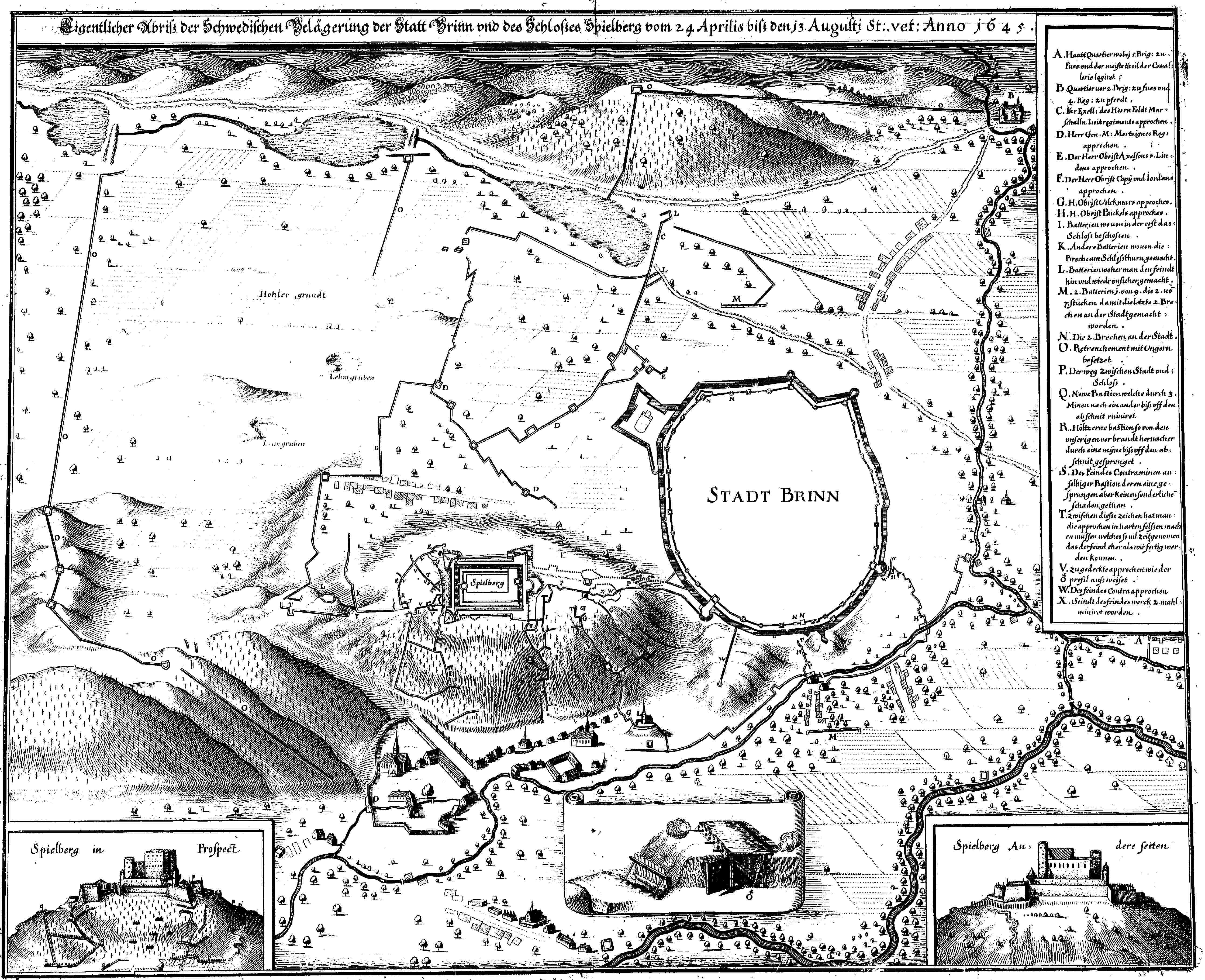 Plán města Brna v roce 1645, tedy v období svého obléhání Švédy, od Meriana